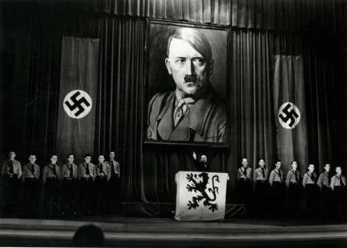 "Belgisch Vlaams-nationalistisch politicus (VNV), schrijver en dichter Ward Hermans (1897 - 1992) als spreker op een vergadering van de Algemene SS Vlaanderen in Gent, tijdens de Duitse bezetting in de Tweede Wereldoorlog. Boven hem groot portret van Hitler. [1941]"